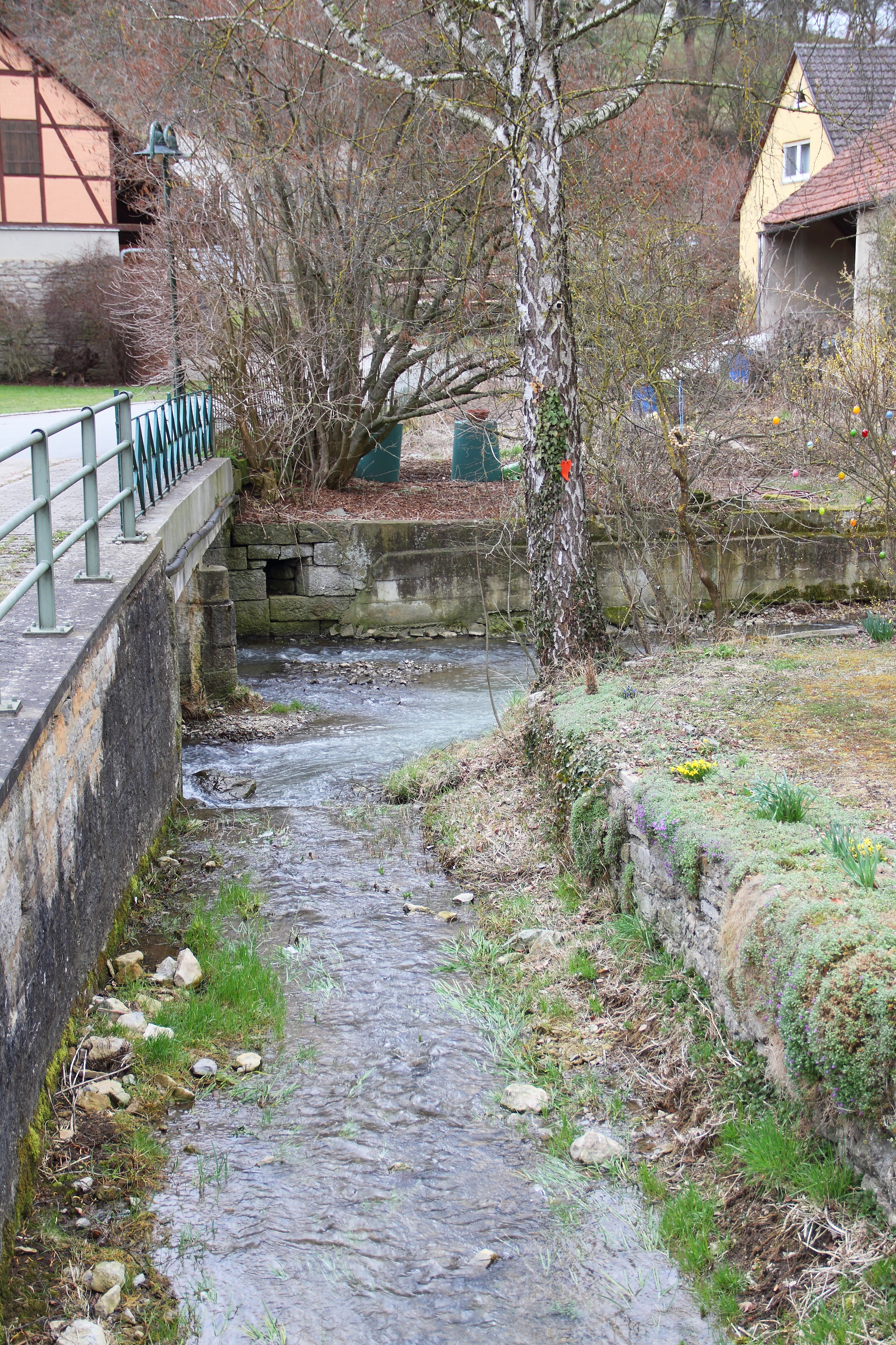 Der Zufluss des Pfitzinger Baches in den Aschbach in der Gemarkung Herrenzimmern.